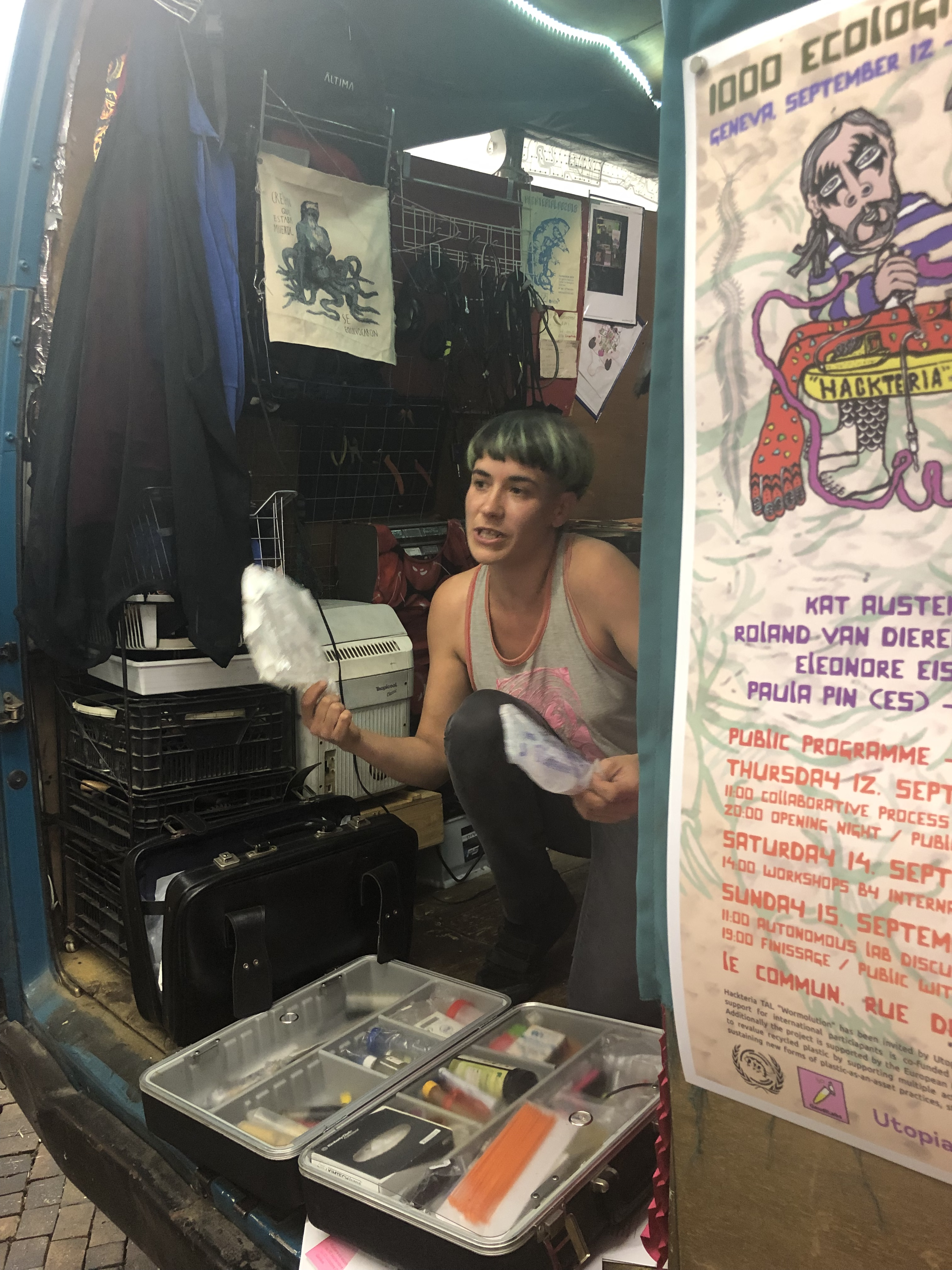 Wormolution, 1000 écologies 12 au 15 septembre 2019